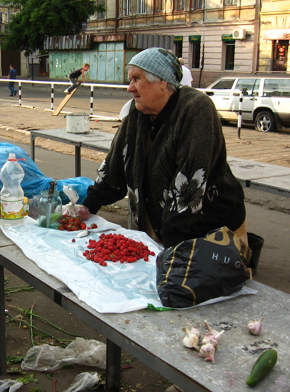 Raspberry vendor, Lviv, Ukraine